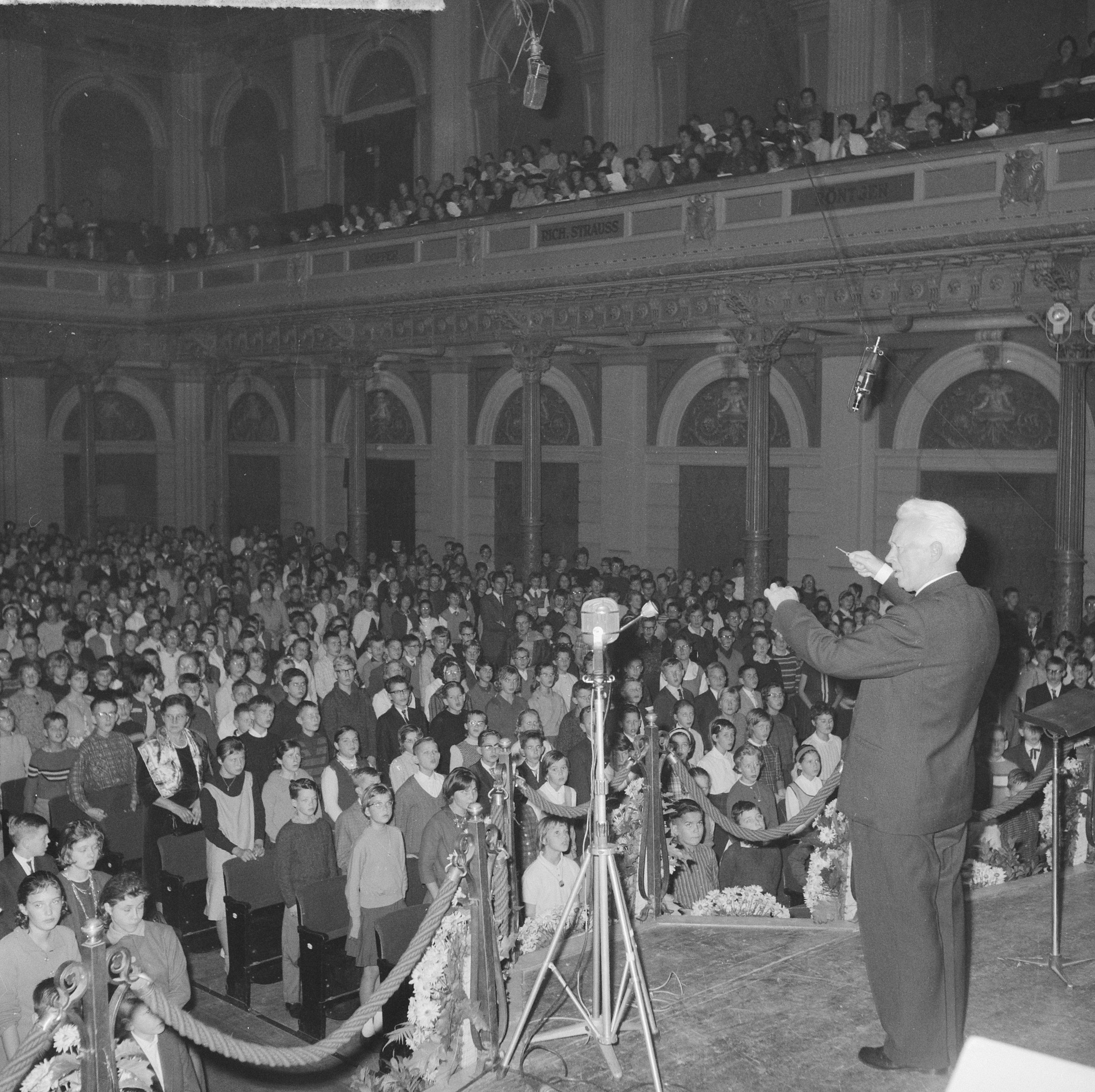 Collectie / Archief : Fotocollectie Anefo Reportage / Serie : [ onbekend ] Beschrijving : Zangmiddag voor kinderen van Openbare en Bijzondere School in Concertgebouw onder leiding van Willem Gehrels Datum : 26 oktober 1962 Trefwoorden : CONCERTGEBOUWEN, Kinderen Persoonsnaam : Gehrels, Willem Fotograaf : Nijs, Jac. de / Anefo Auteursrechthebbende : Nationaal Archief Materiaalsoort : Negatief (zwart/wit) Nummer archiefinventaris : bekijk toegang 2.24.01.03 Bestanddeelnummer : 914-4554